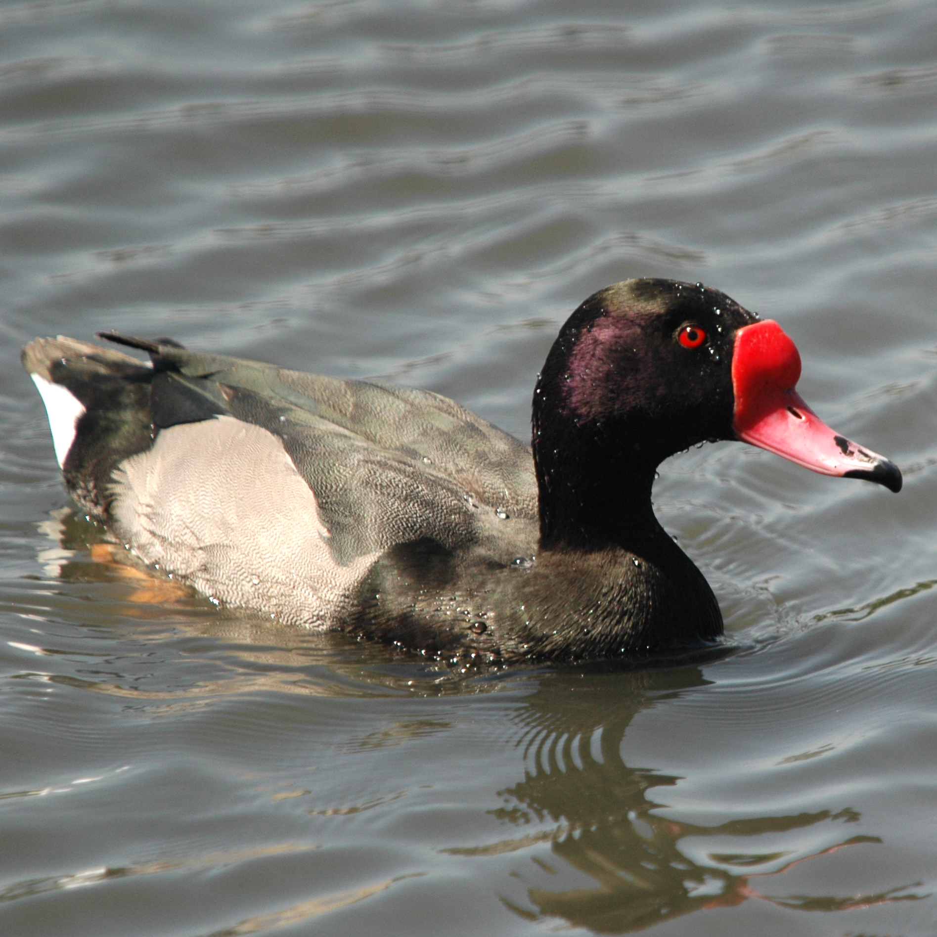 Netta peposaca male, Costanera Sur Ecological Reserve, Buenos Aires.